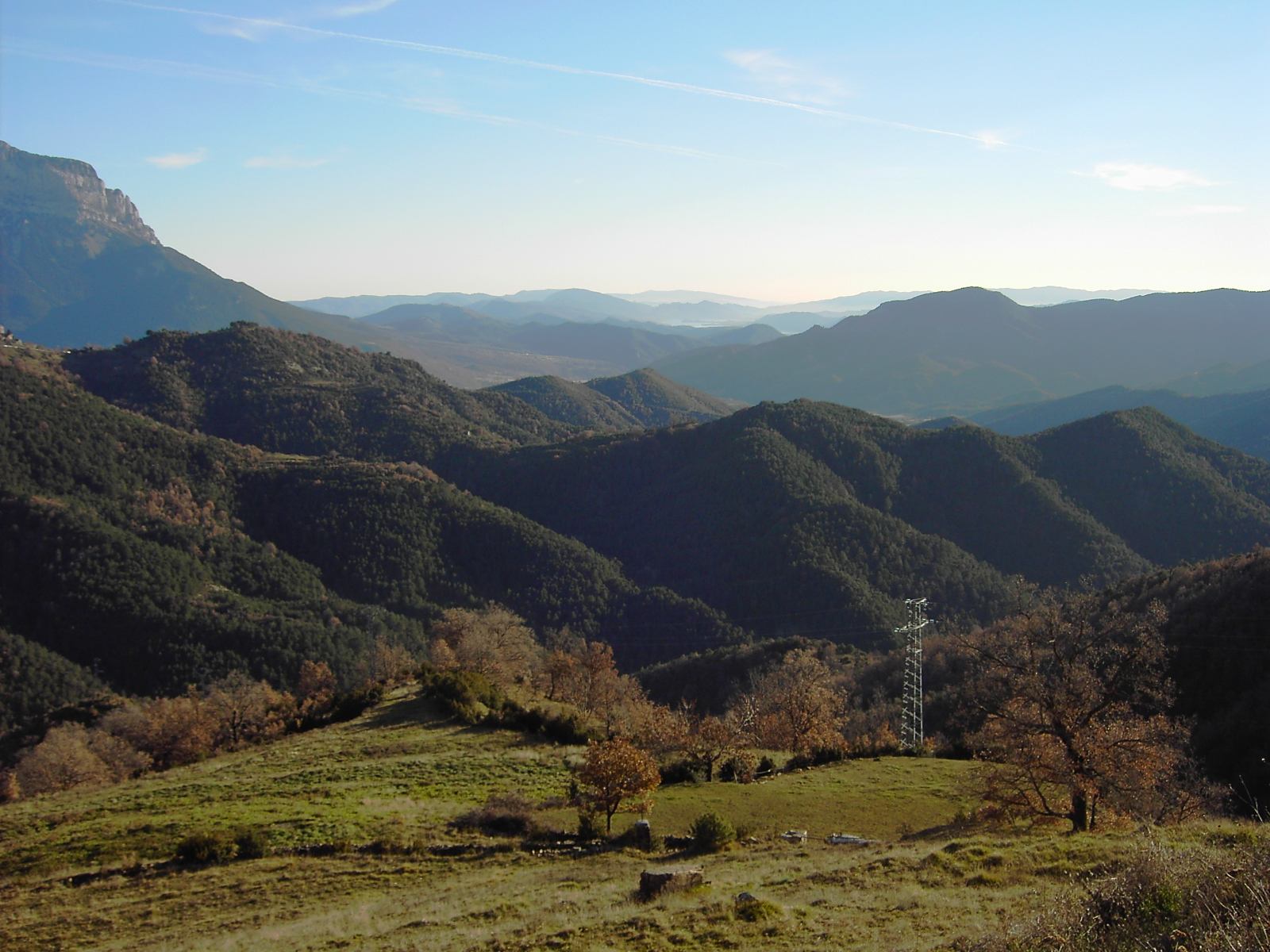 Faixetas o bancales en el Valle de Puértolas, Sobrarbe, Pirineo Aragonés, España.